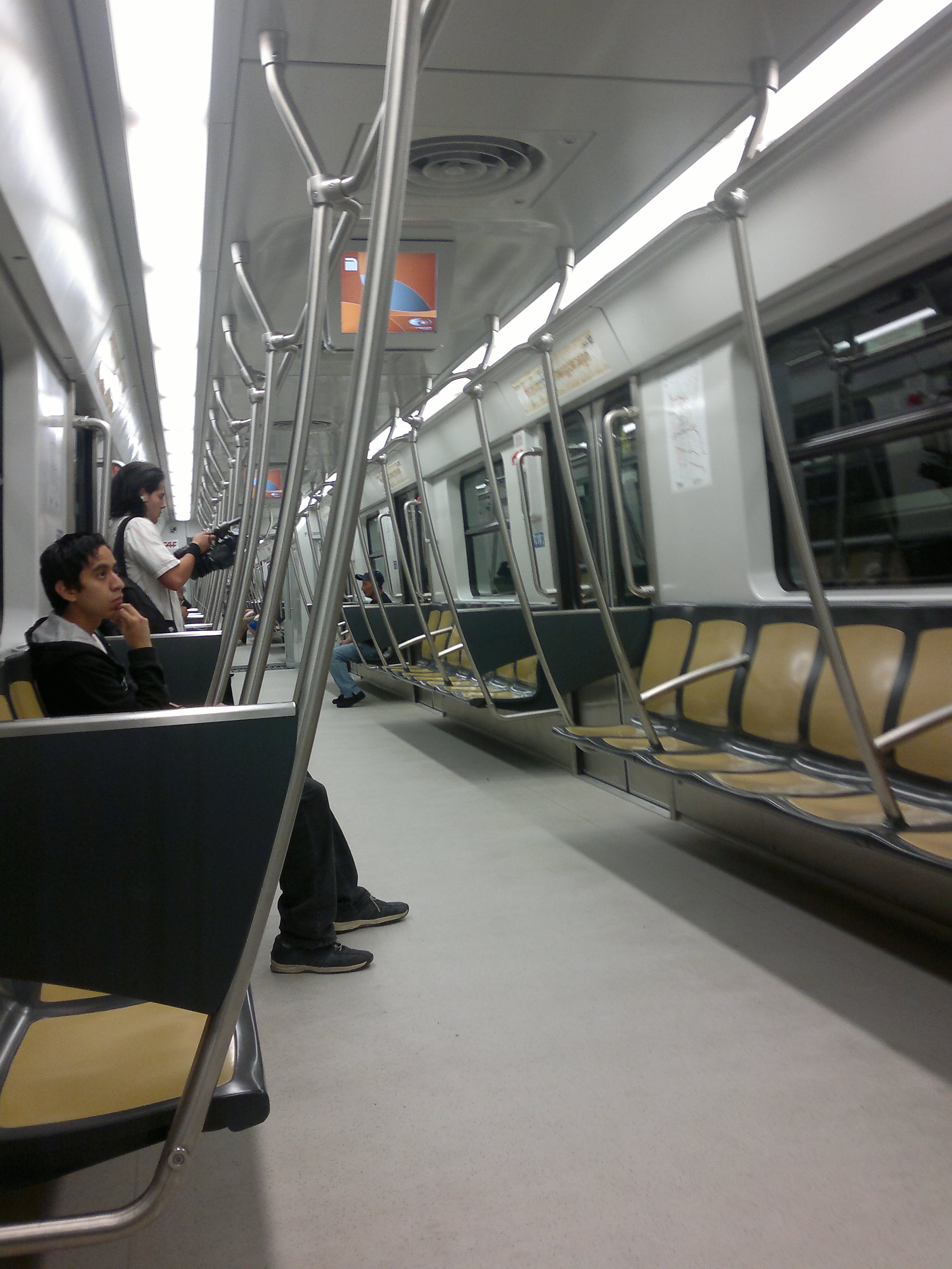 Interior del tren Arq. Teodoro González de León, Línea 12 del Metro de la Ciudad de México